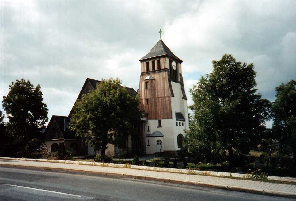 Kirche in Zinnwald